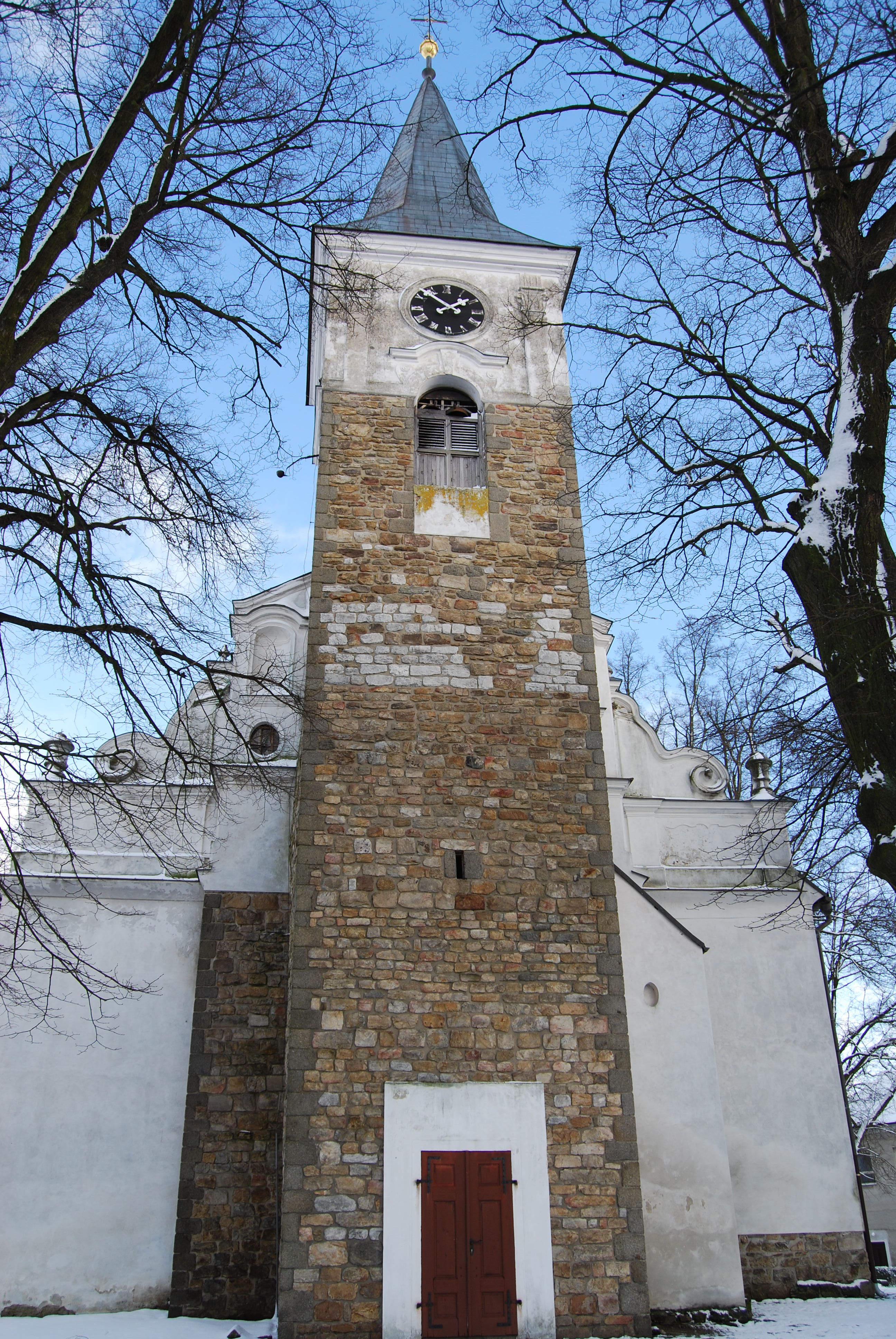 Kostel sv. Martina. Bernartice. Okres Písek. Česká republika.